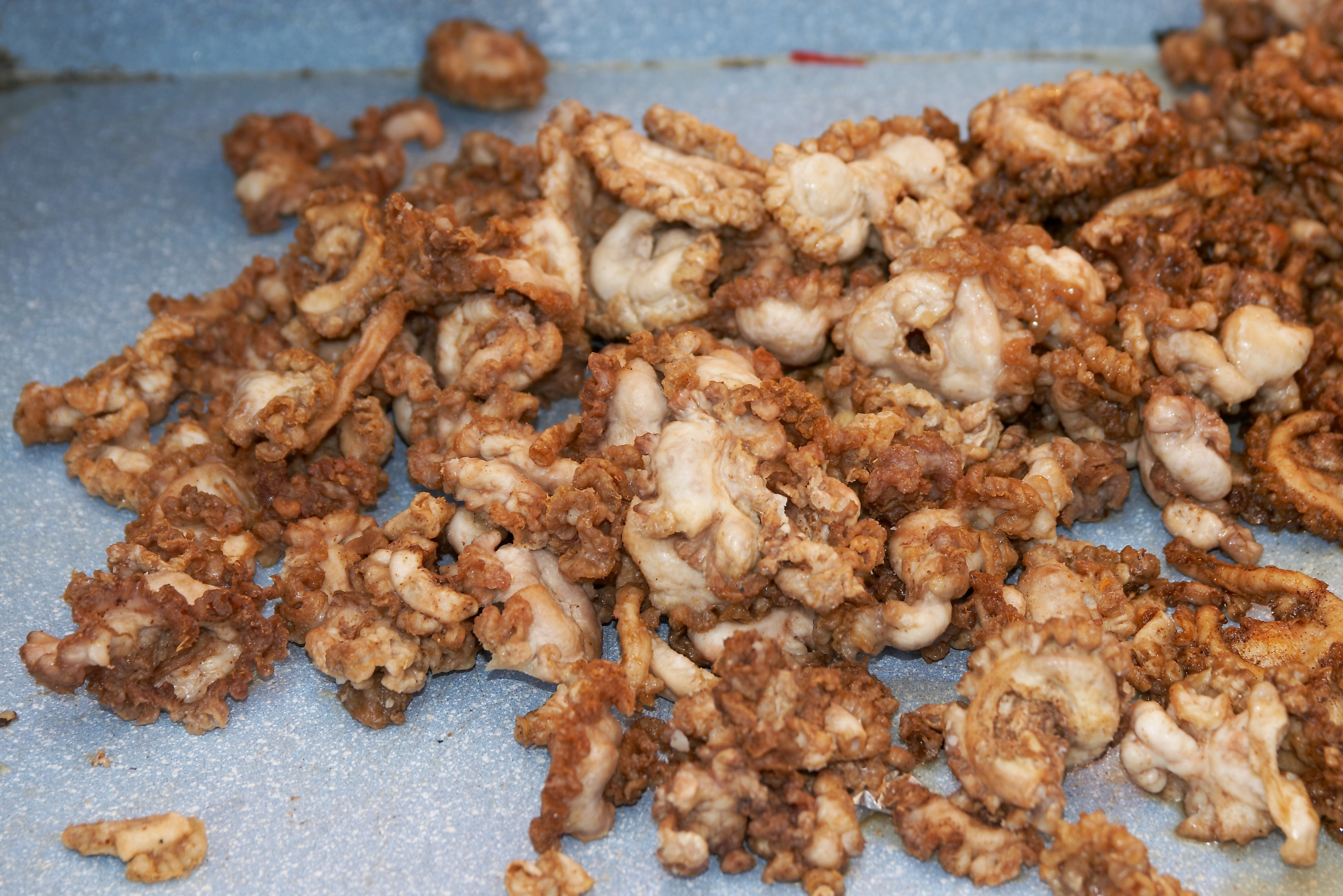 Entresijos. Fiestas de San Isidro 2007, Madrid, España.